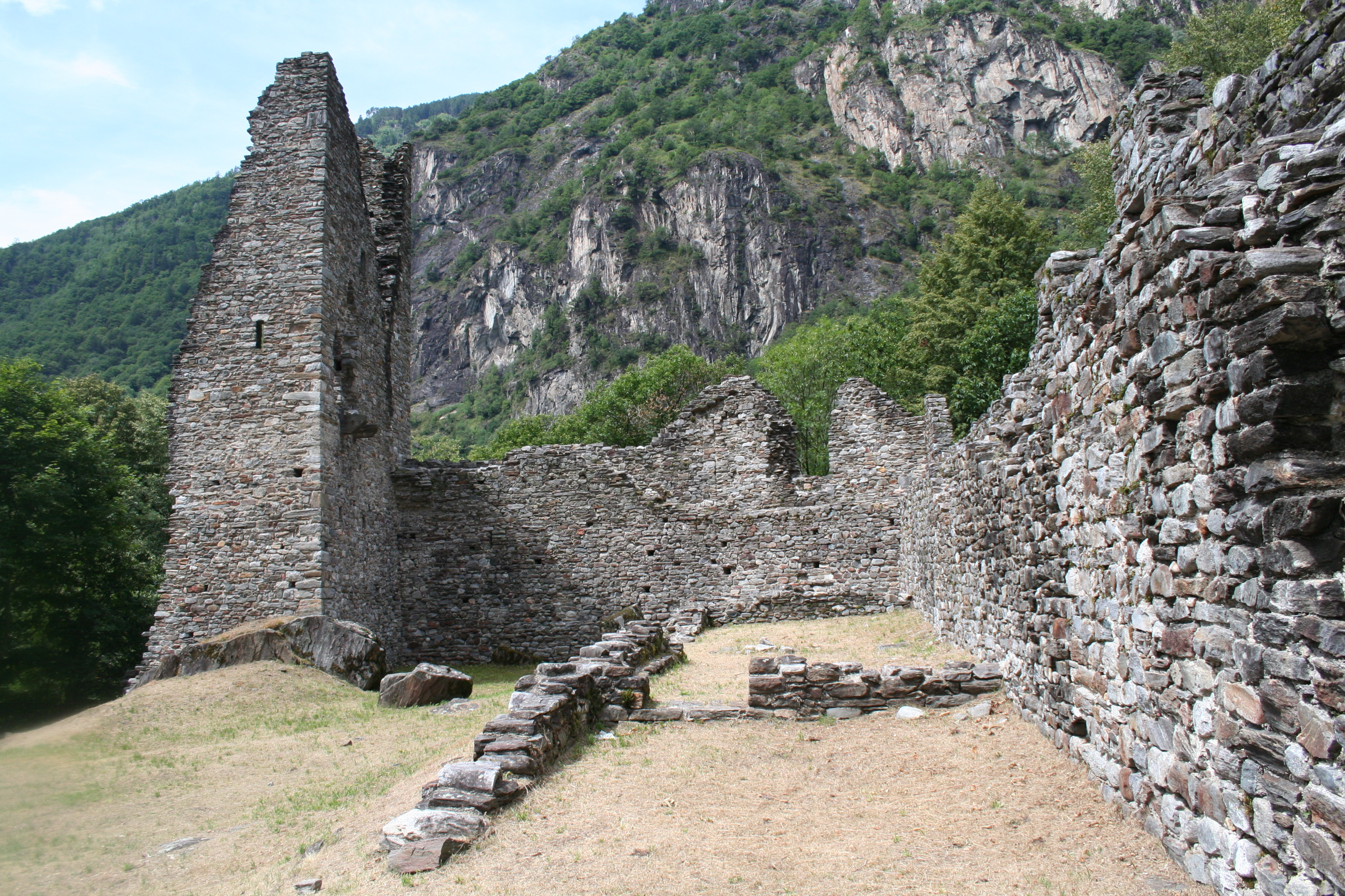 Ruine Norantola: Blick durch den Nordtrakt nach Westen